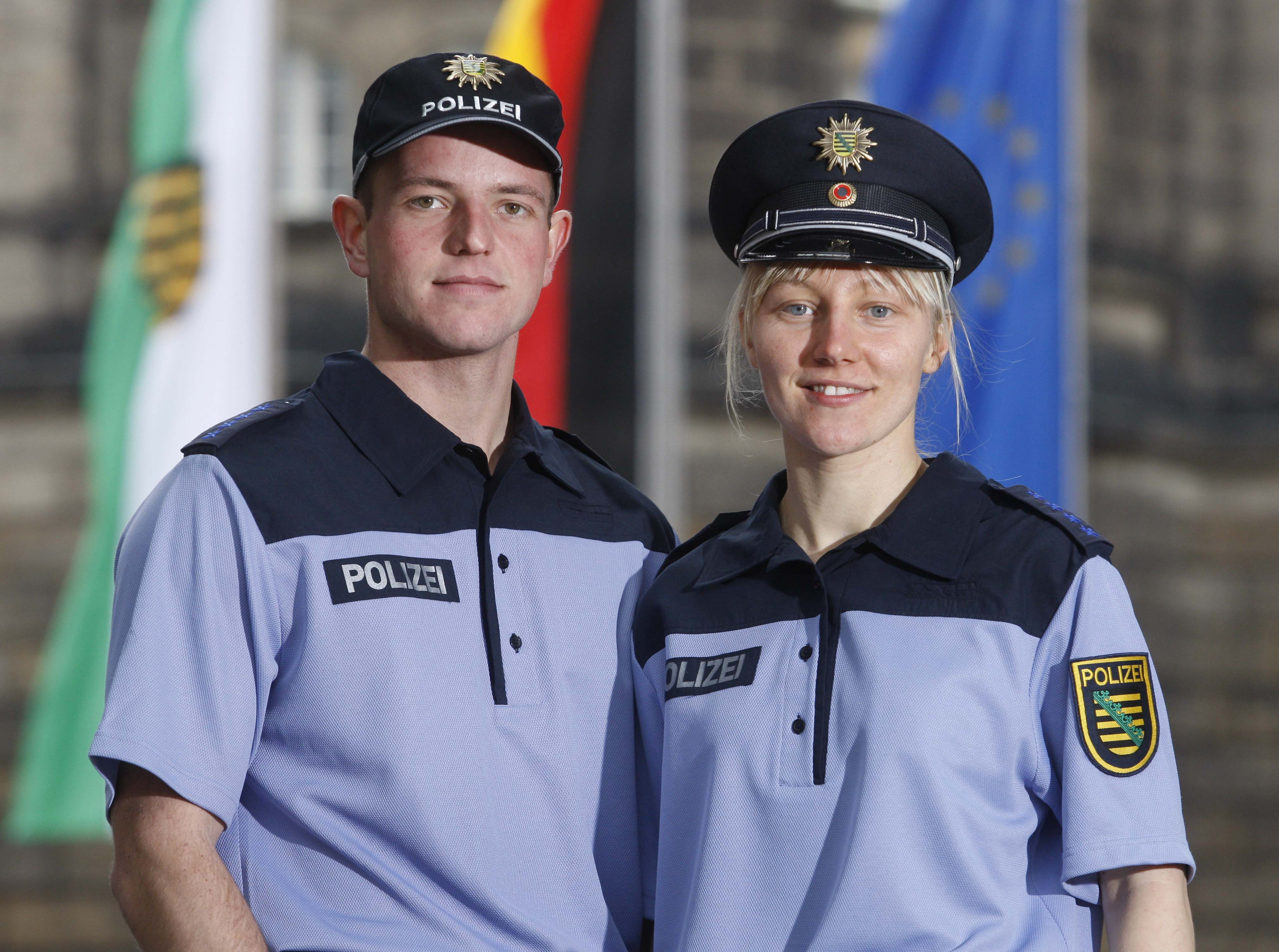 Neue blaue Uniform der Polizeien der Länder Berlin, Brandenburg und Sachsen